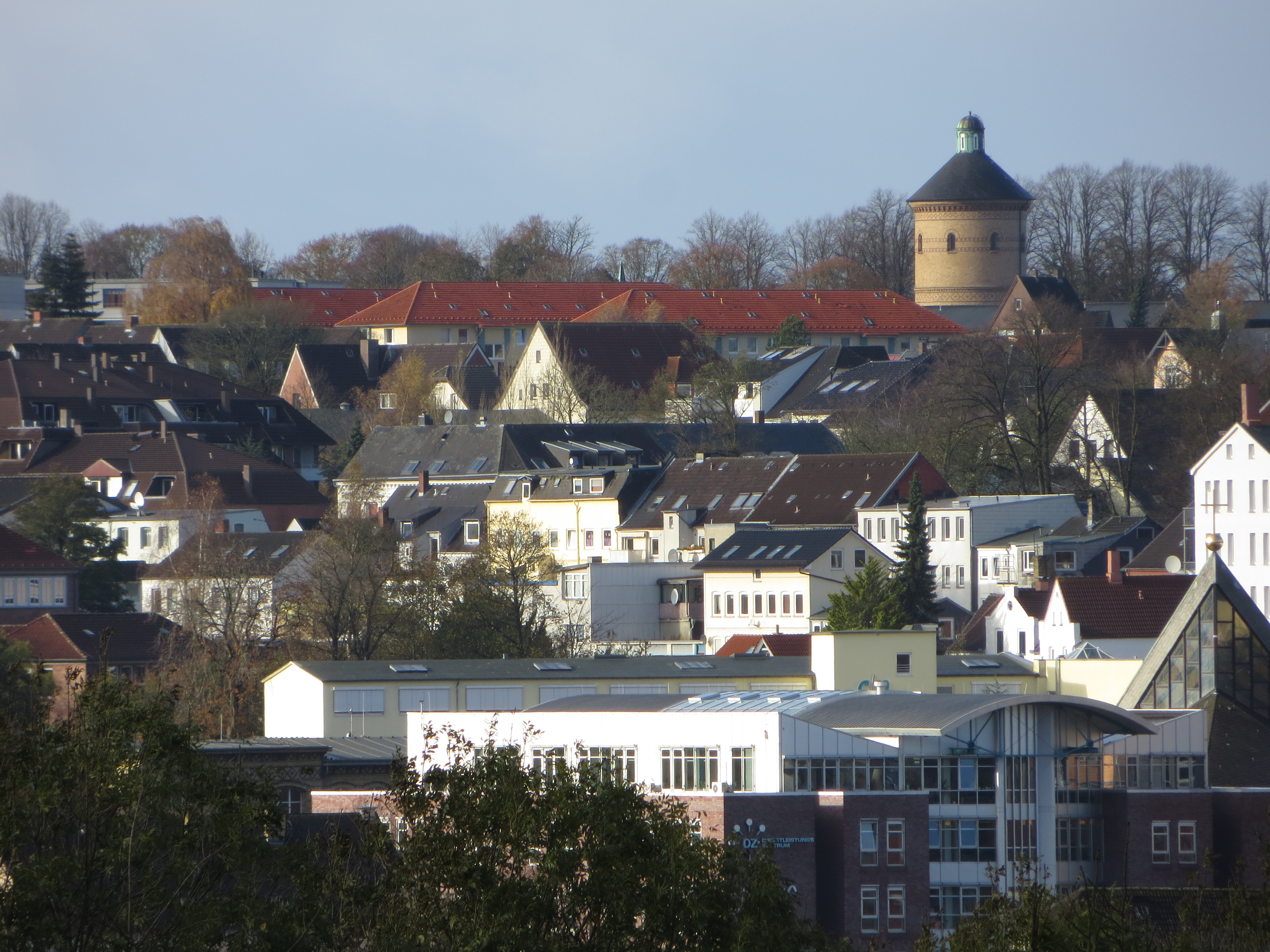 Alter Wasserturm vom Sandberg aus (Flensburg 2013), Bild 02